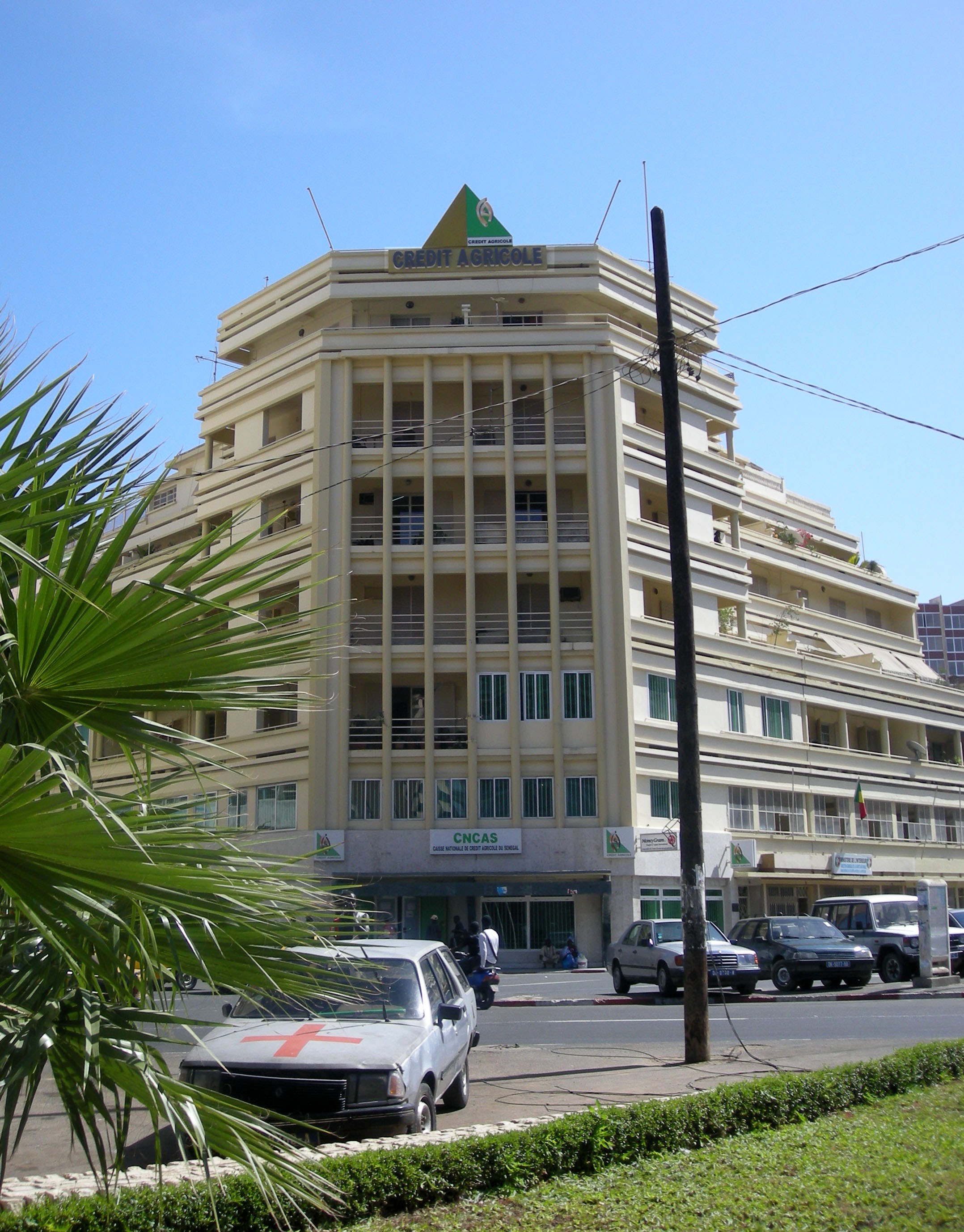 Siège de la CNCAS (Caisse nationale de crédit agricole du Sénégal) sur la place de l'Indépendance à Dakar (Sénégal)